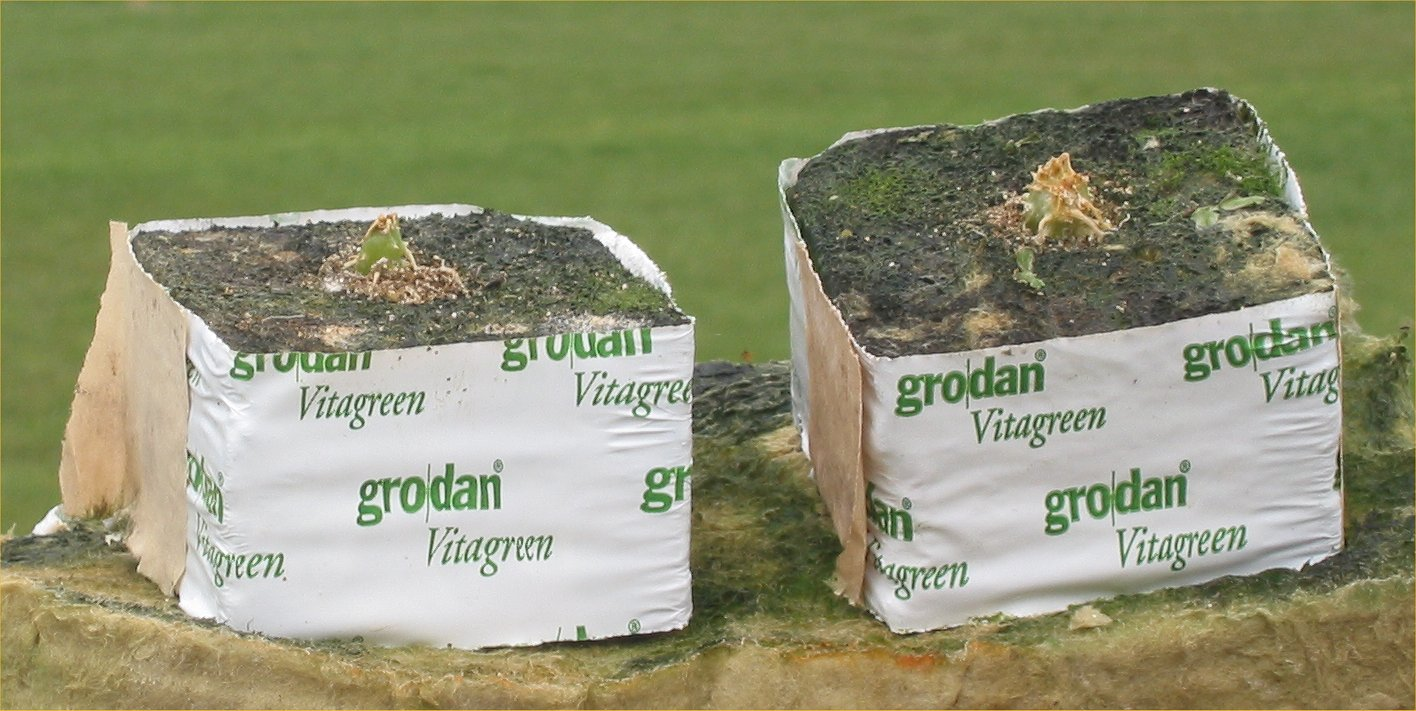 (Steenwolpotjes) Mineral wool pots